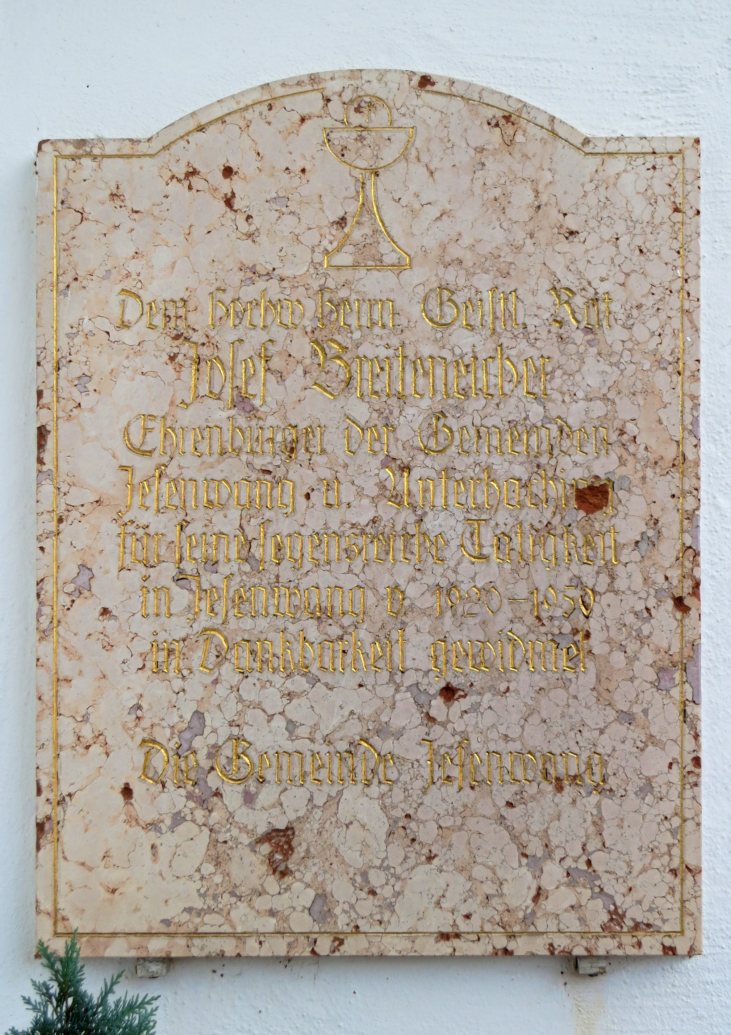 Epitaph für Josef Breiteneicher an der Außenwand der Kirche St. Michael in Jesenwang